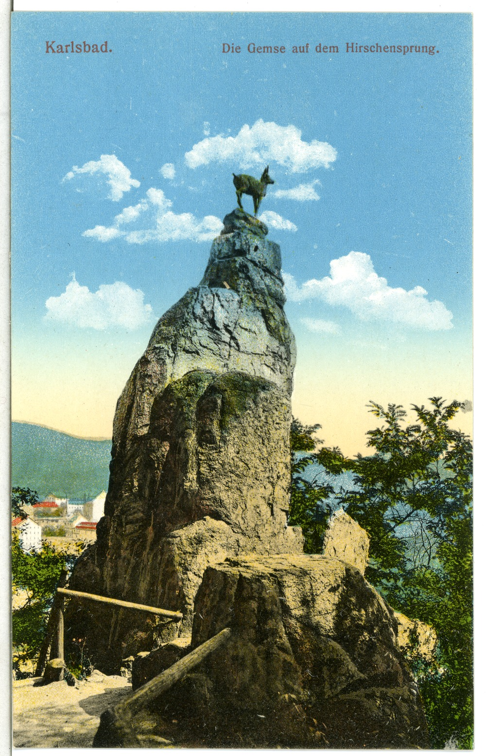 Karlsbad; Die Gemse auf dem Hirschensprung This postcard is from publisher Brück & Sohn in Meißen ( This postcard has a unique number 11804 and is available in a higher resolution at the publisher. This images was uploaded in a cooperation project between Wikipedians and the publisher.